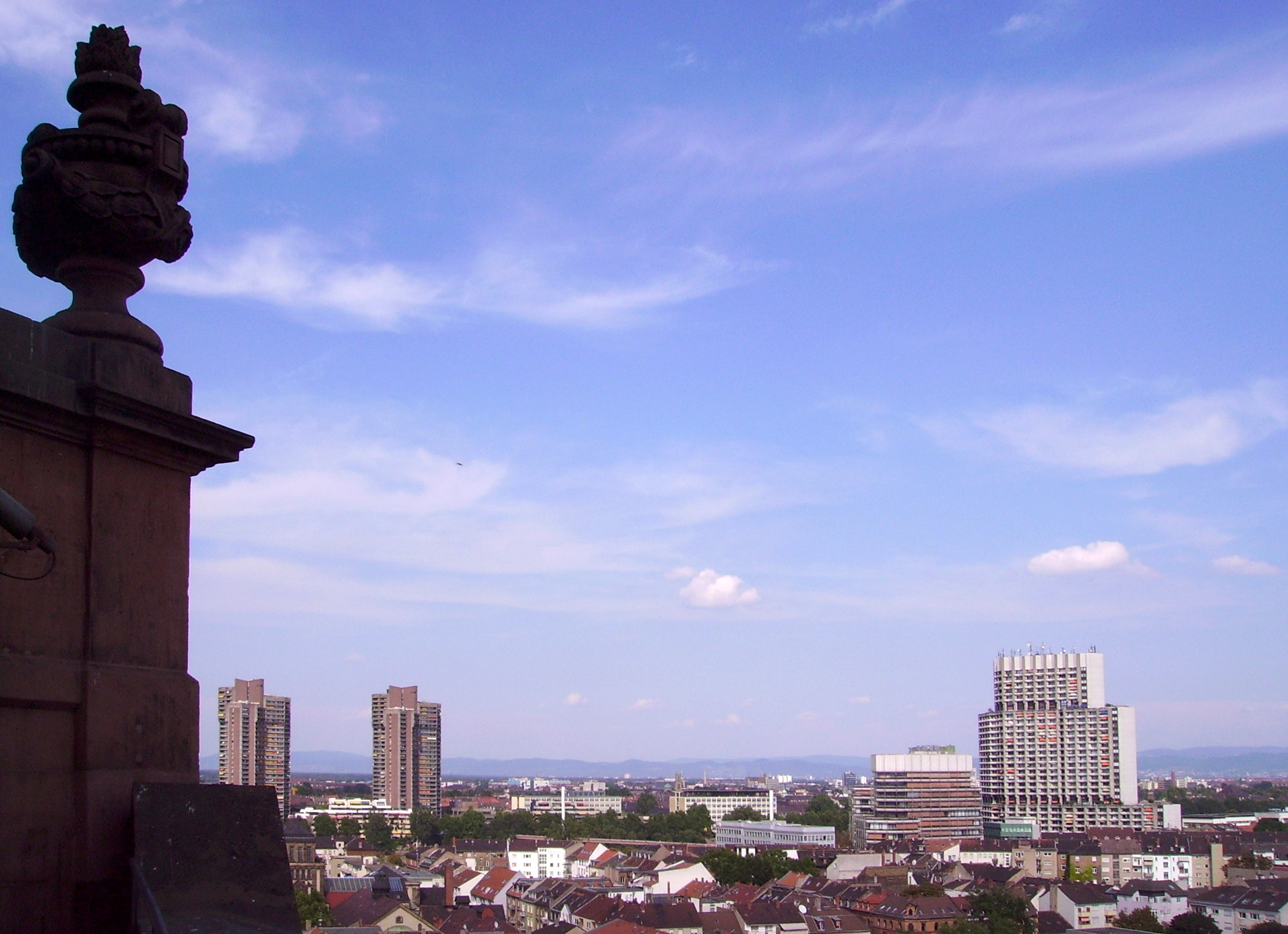 Aussicht von der Konkordienkirche in Mannheim